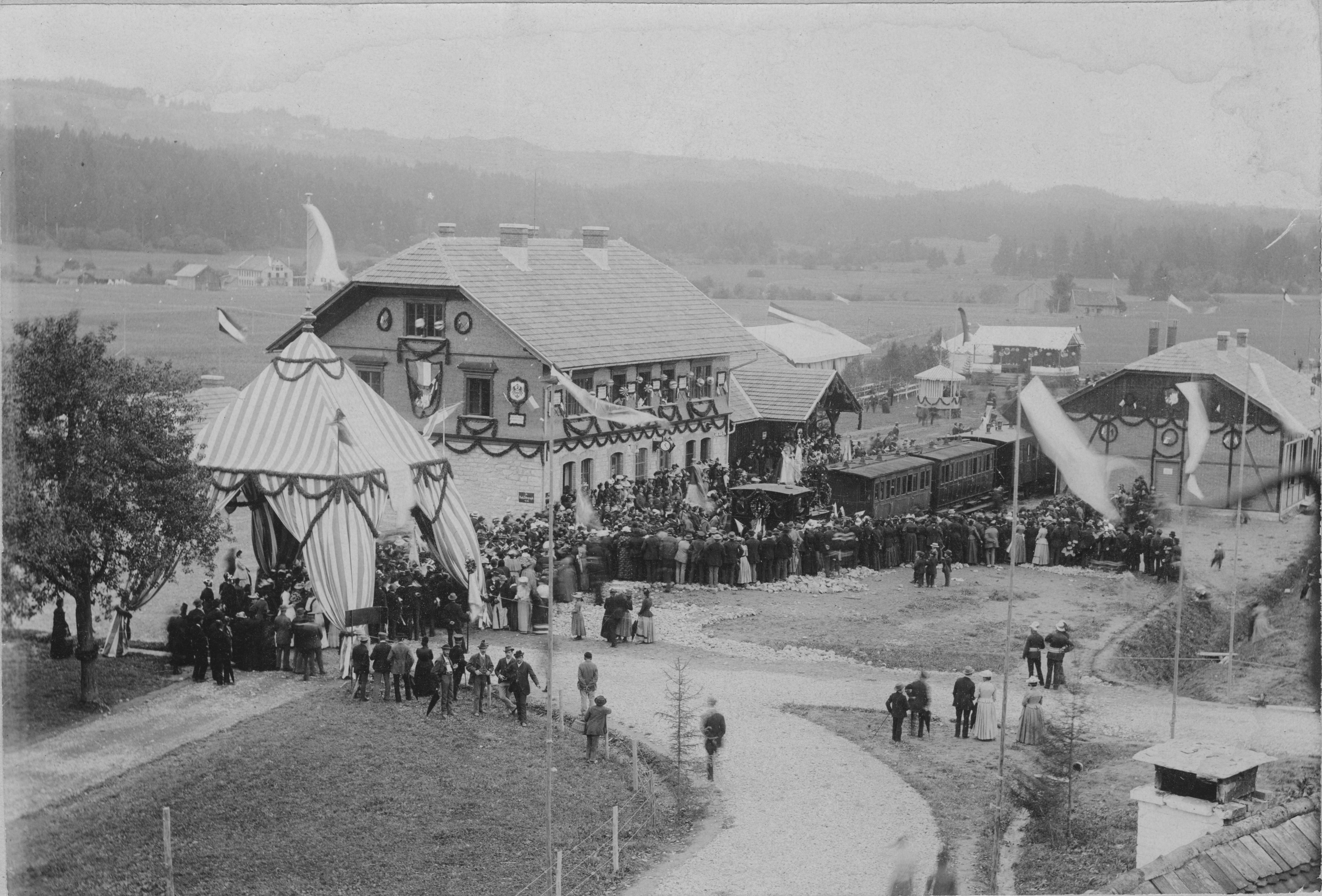 Photo von den Eröffnungsfeierlichkeiten der Lokalbahnstrecke Weiler-Röthenbach im Bahnhof Weiler im Allgäu am 22. Juli 1893